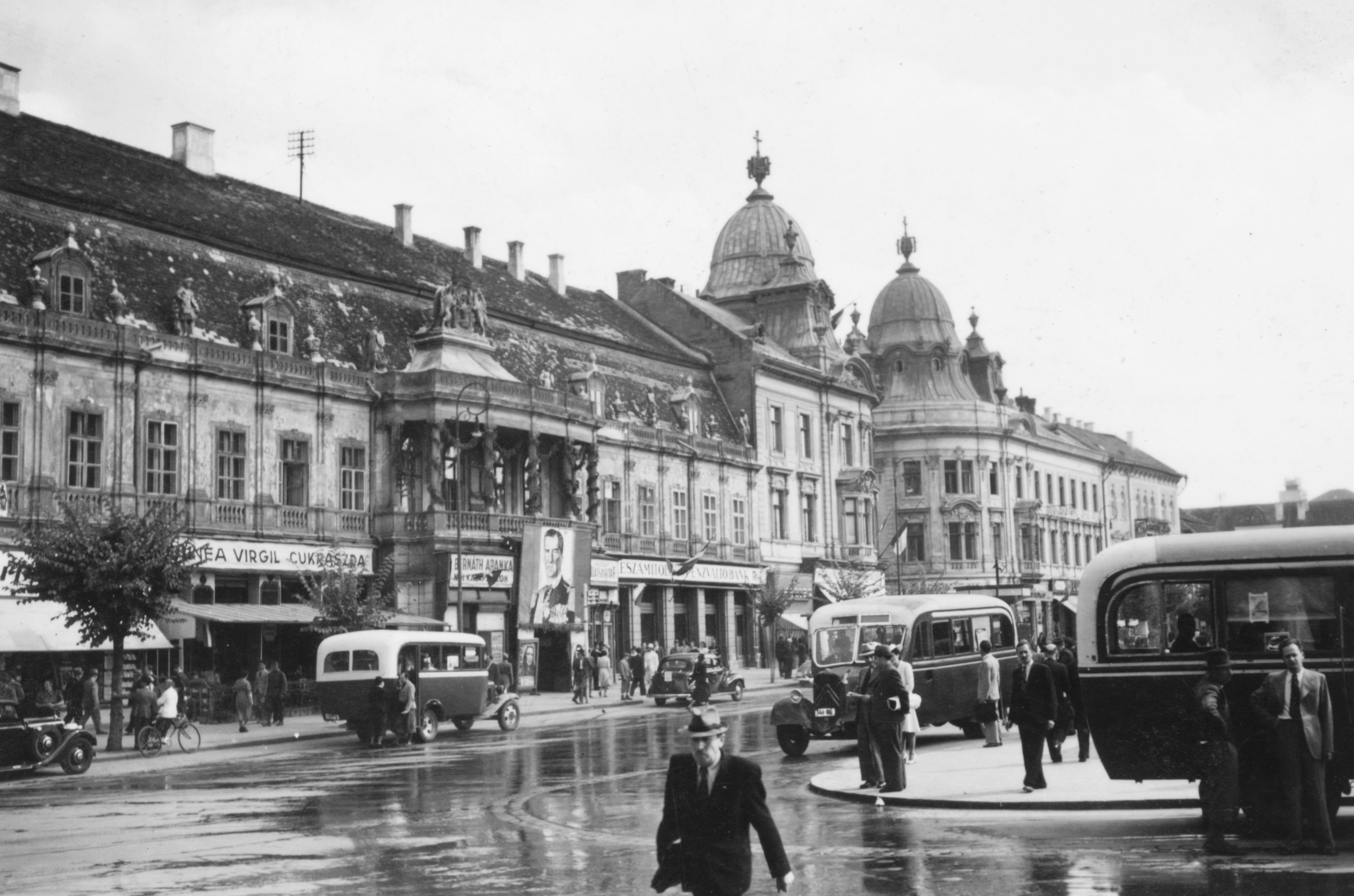 Fő tér a Szentegyház utca torkolata felé nézve, balra a Bánffy palota. Location: Romania, Transylvania, Cluj-Napoca Tags: street view, genre painting, bus, sign-board, pastry shop, hat, perfume, Nicolaus Horthy portrayal, bicycle Title: Fő tér a Szentegyház utca torkolata felé nézve, balra a Bánffy palota.